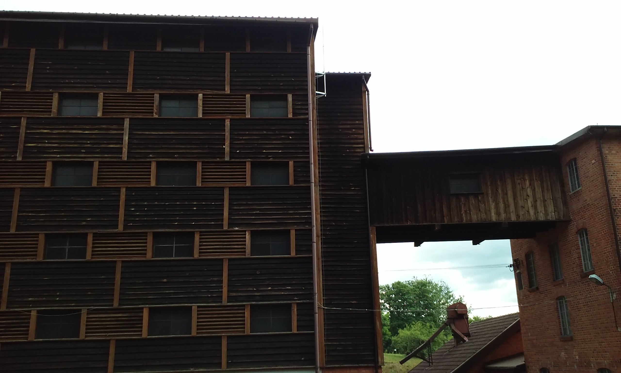 Wyłuszczarnia nasion w Rucianem-Nidzie - stary budynek.